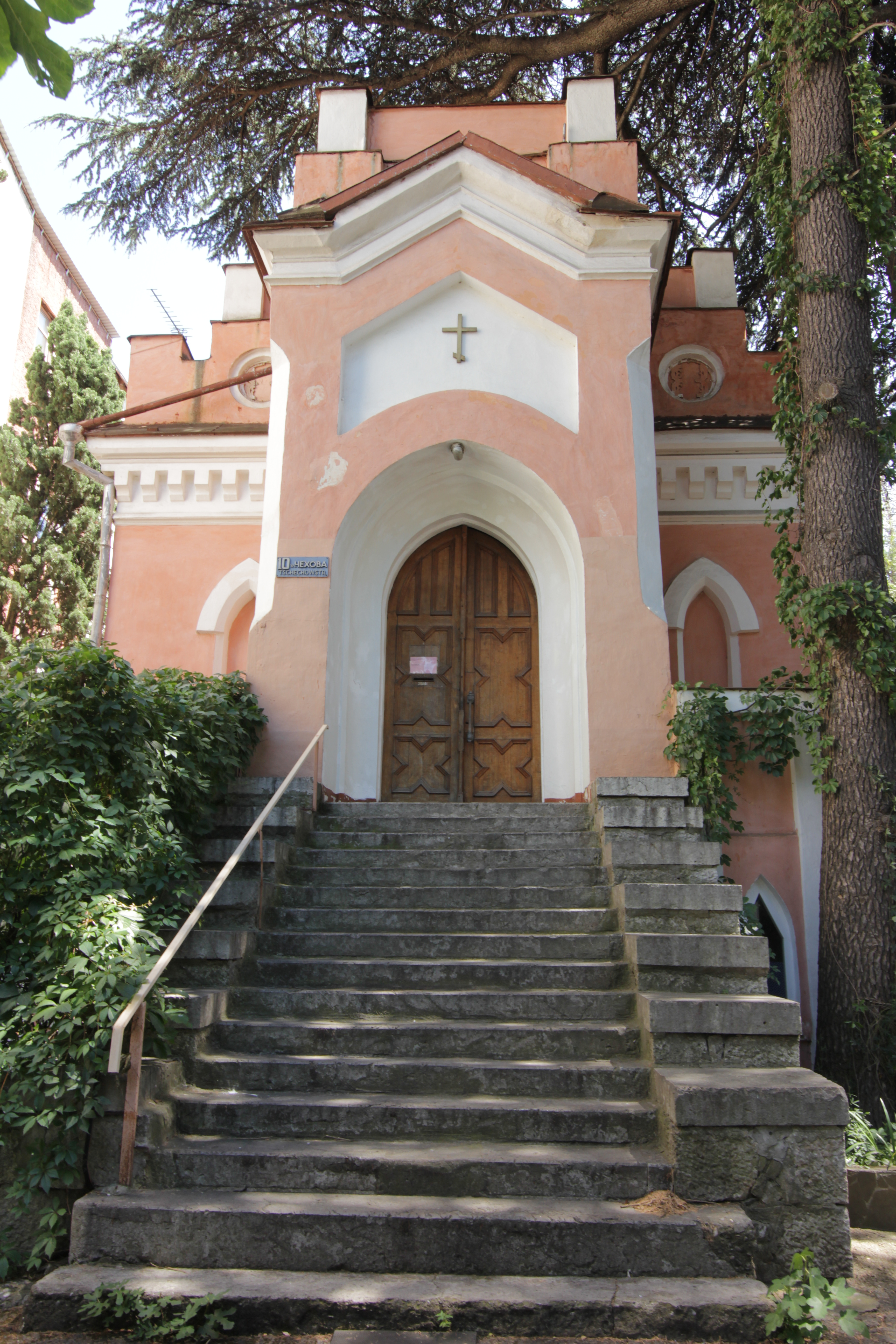 Кирха: улица Чехова, 10, литер "А", Ялта, Крым This object is located on the Crimean Peninsula and recognized as cultural heritage by Russia under the monument ID: 8231653000. The legal status of the Crimean region is currently disputed.